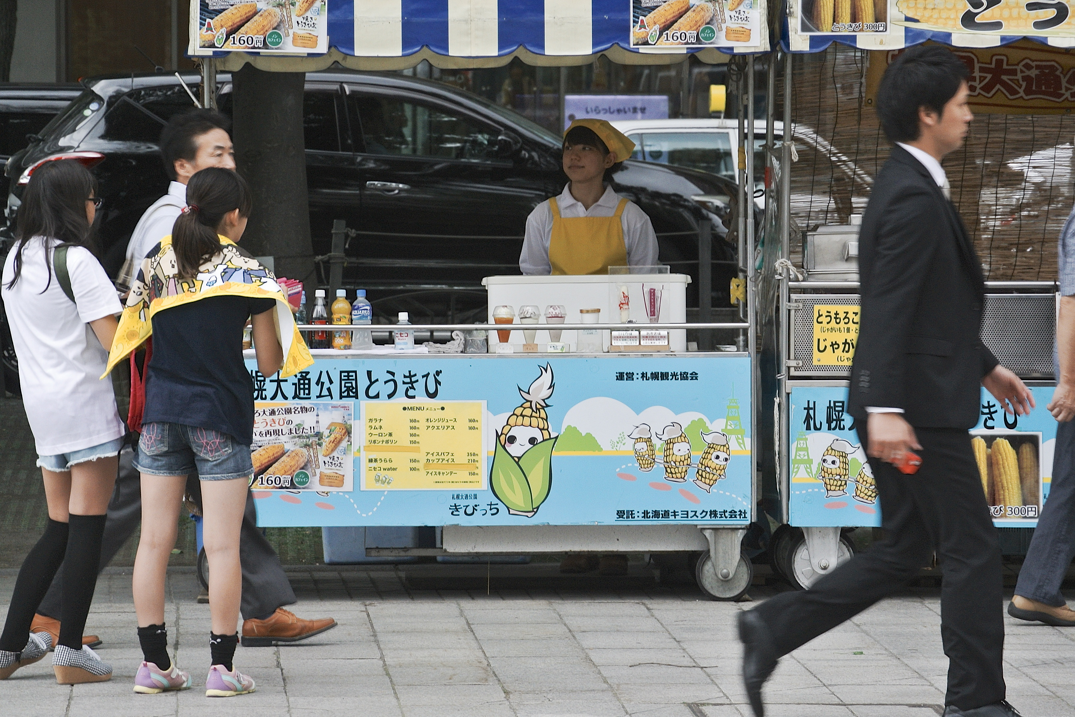 大通公園の名物とうきび売り。 いつも年配のおばさんばかりだけど、なんだか若くて可愛い売り子さんだぞ。